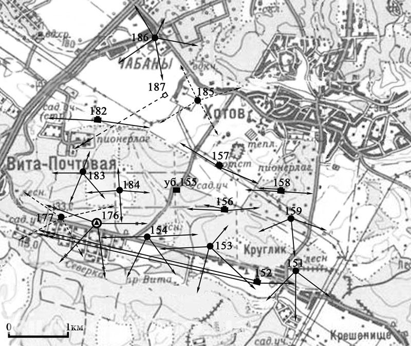 Схема БРО 7 Київського укріпленого району, викладена у вільний доступ авторами книги "Киевский укрепленный район 1928—1941" (